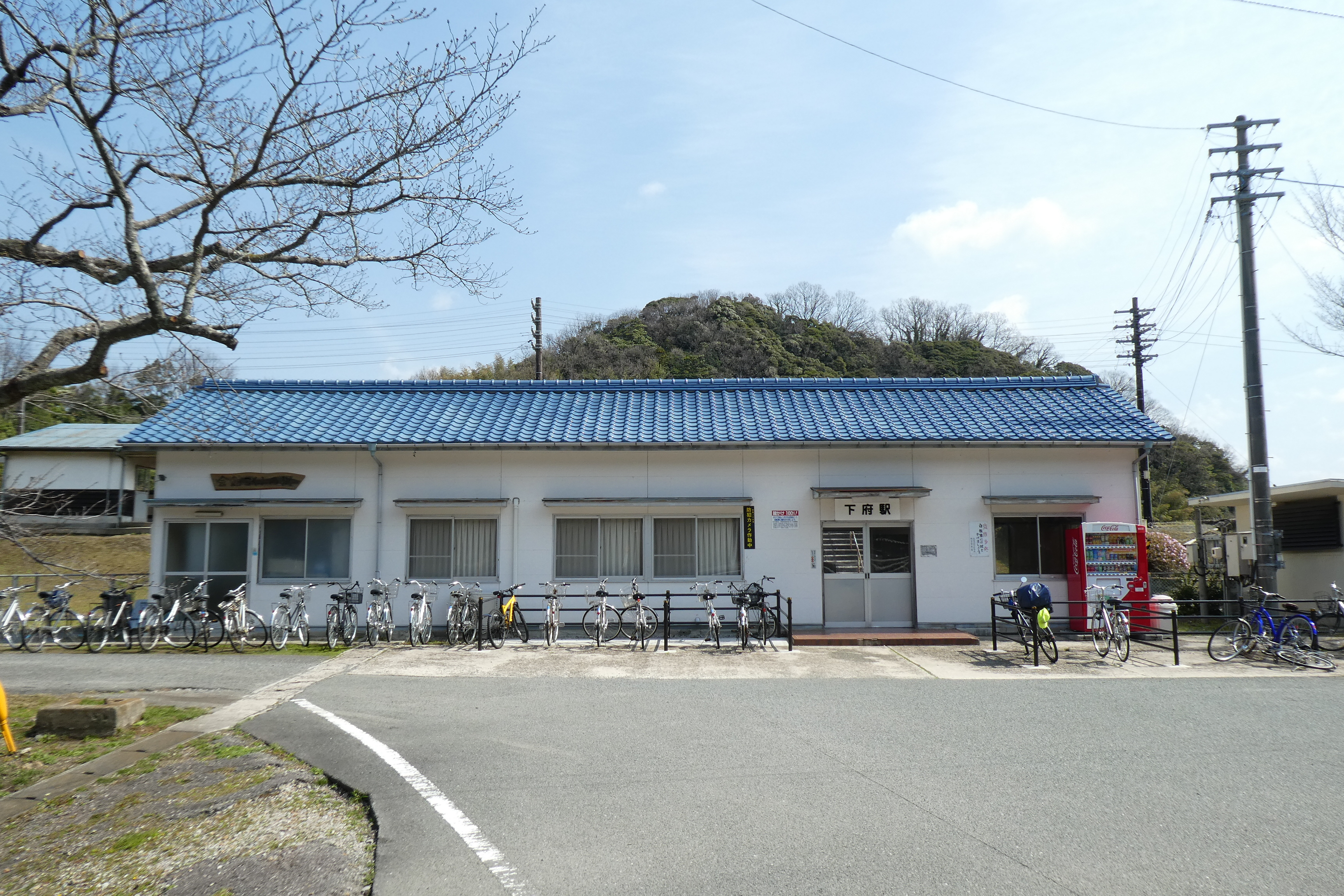 山陰本線下府駅。